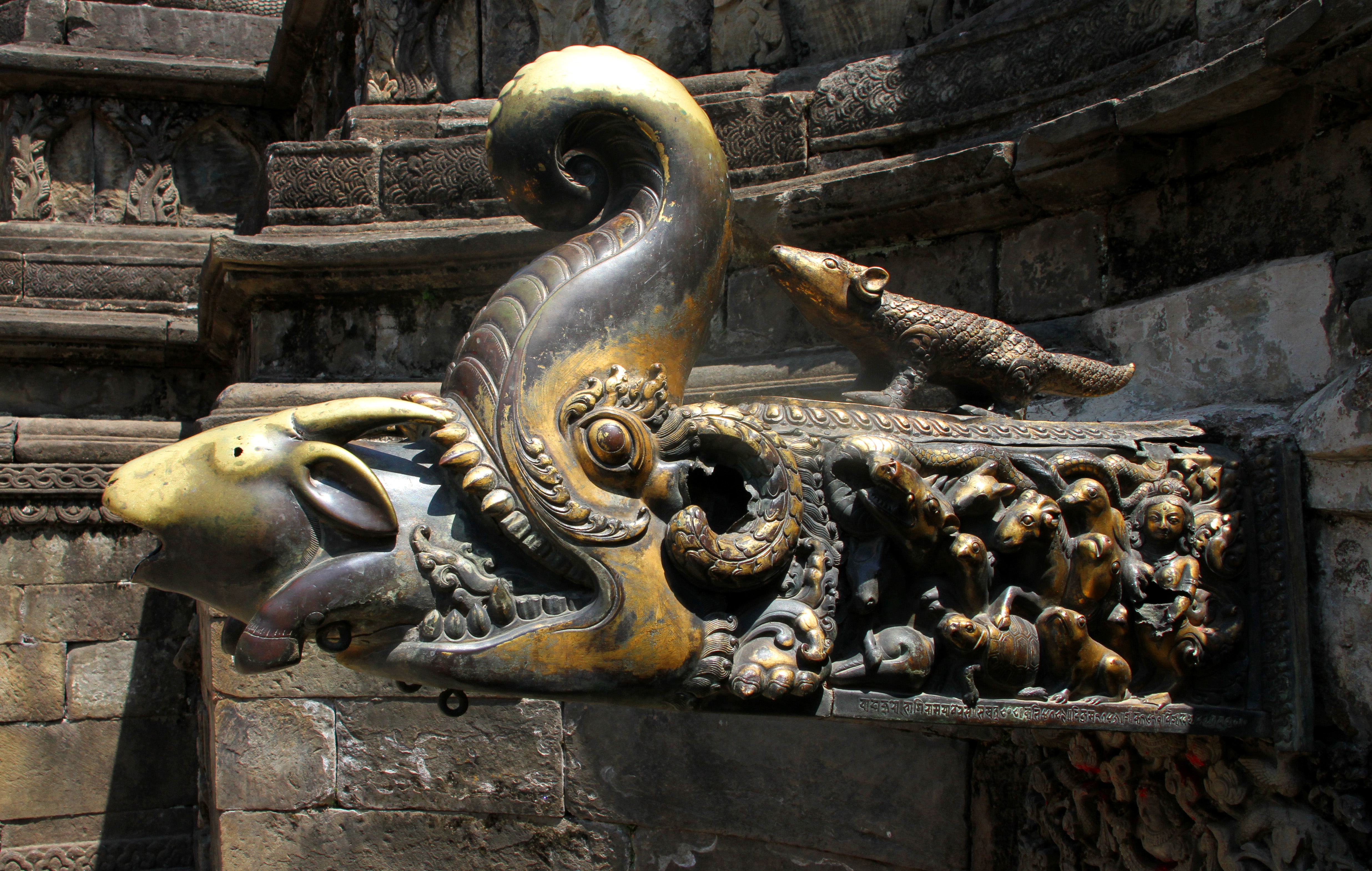 Bhaktapur, Naga Pokhari; ritueller Teich im königlichen Palast